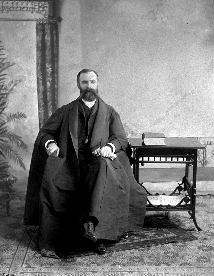 Herbert Charles Wilson in 1885